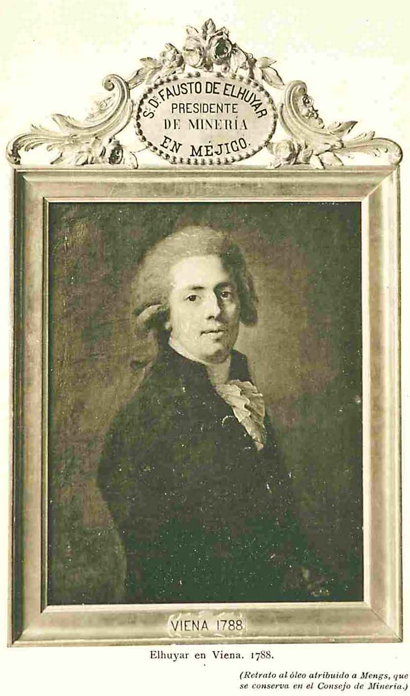 Retrato de Fausto Elhuyar (Fausto D'Elhúyar)